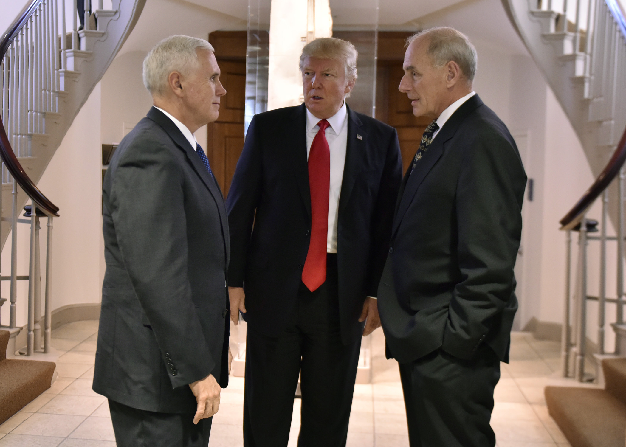 POTUS visits DHS